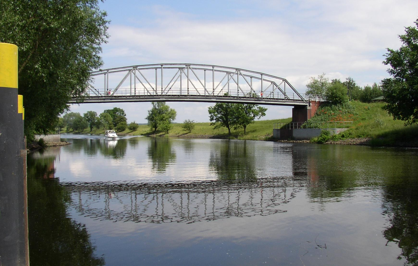 Brücke über die Hohensaaten-Friedrichsthaler Wasserstraße in Lunow-Stolzenhagen in Brandenburg, Deutschland